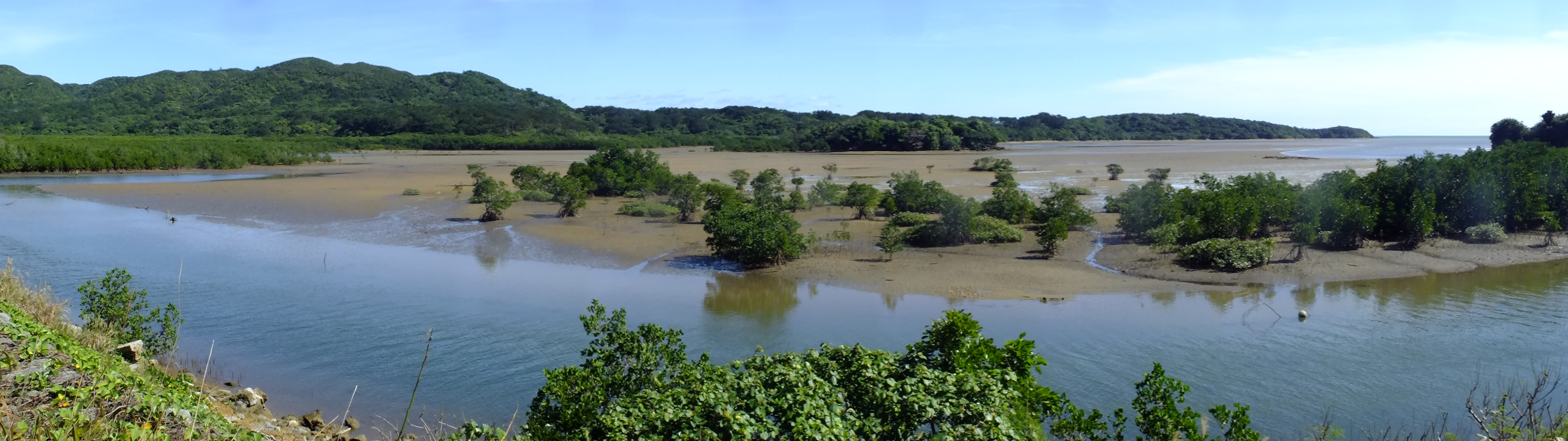 古見の浦と呼ばれる内湾の河口干潟 2017-01-29 Komi beach in Iriomotejima,Shiira river